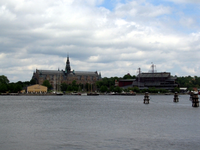 Noordse Museum en Vasamuseum, Stockholm - eigen werk (Sixtus) - vrijgegeven onder GFDL